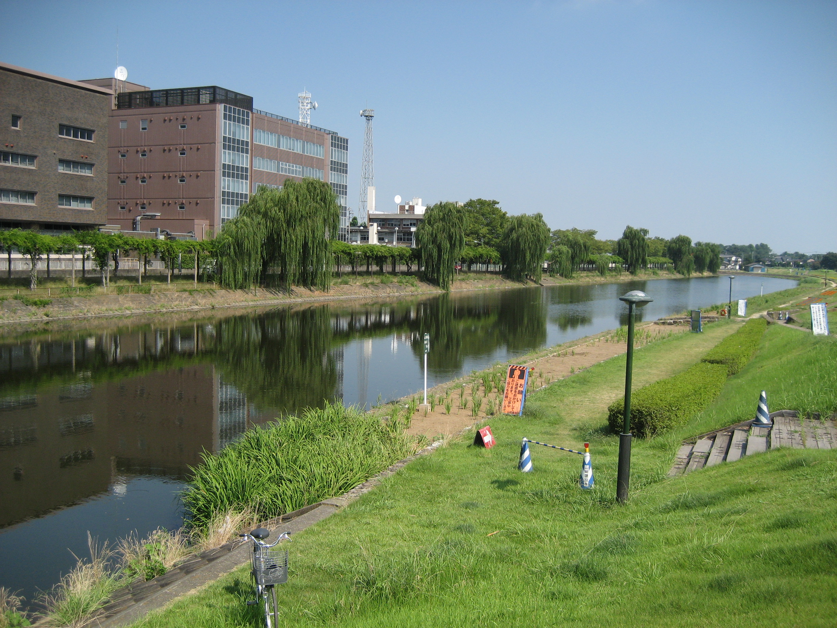 葛西用水埼玉県越谷市越谷市役所付近を撮影